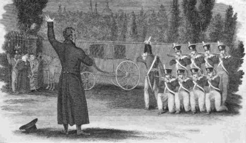 Grabado del fusilamiento del mariscal Michel Ney